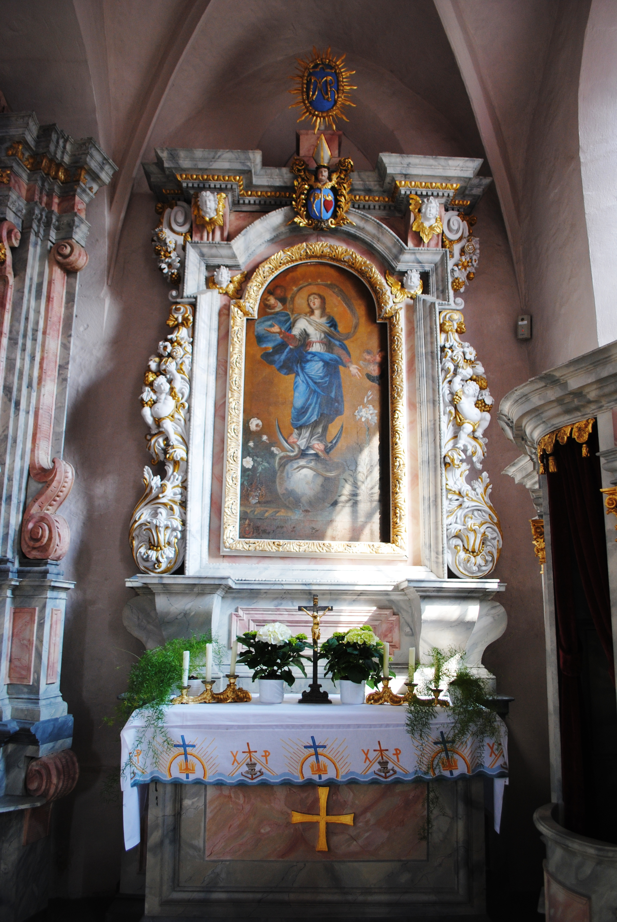 Kirche Dimbach, Volkach, Rechter Seitenaltar